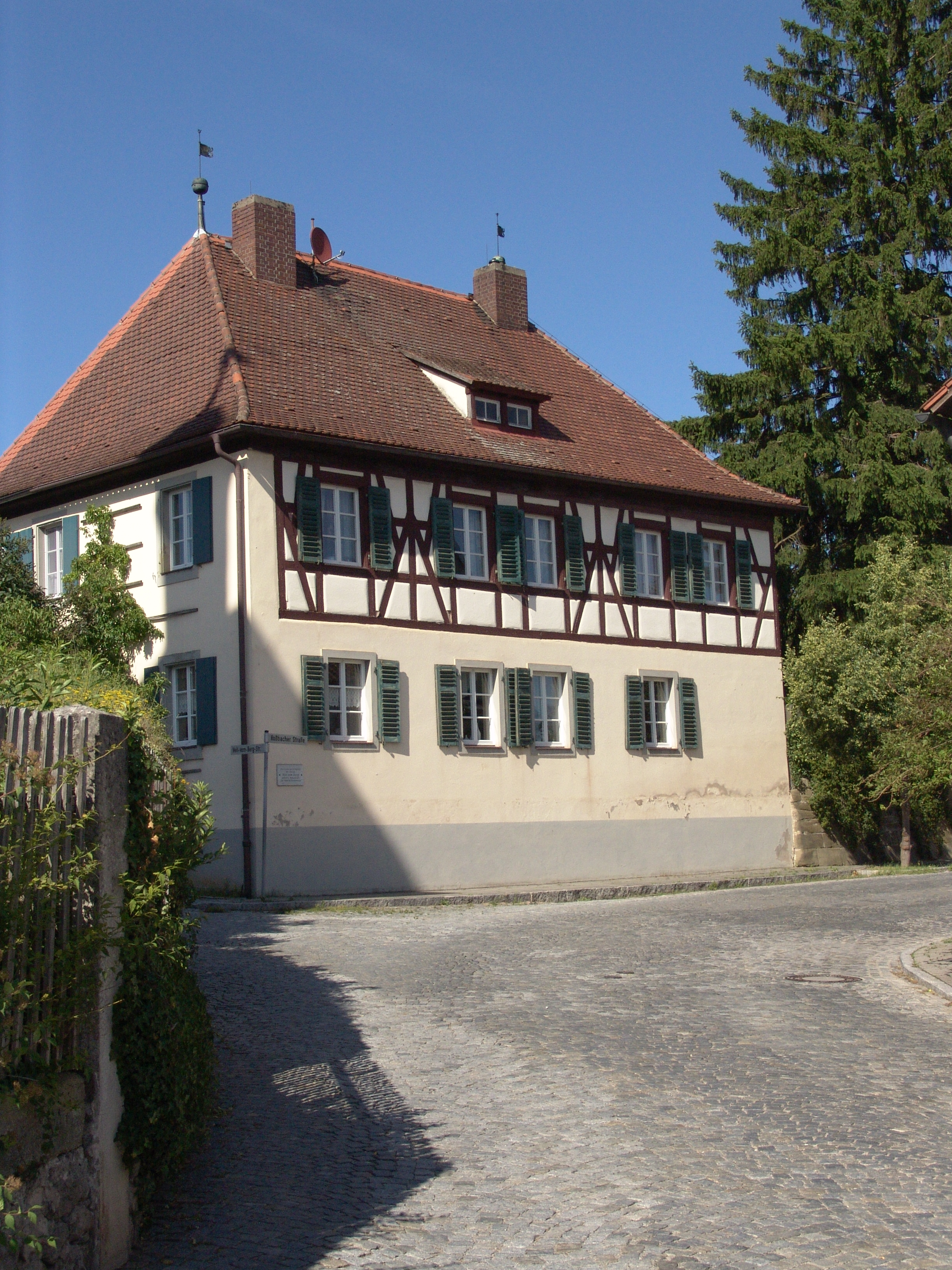 Baudenbach Evangelisches Pfarrhaus